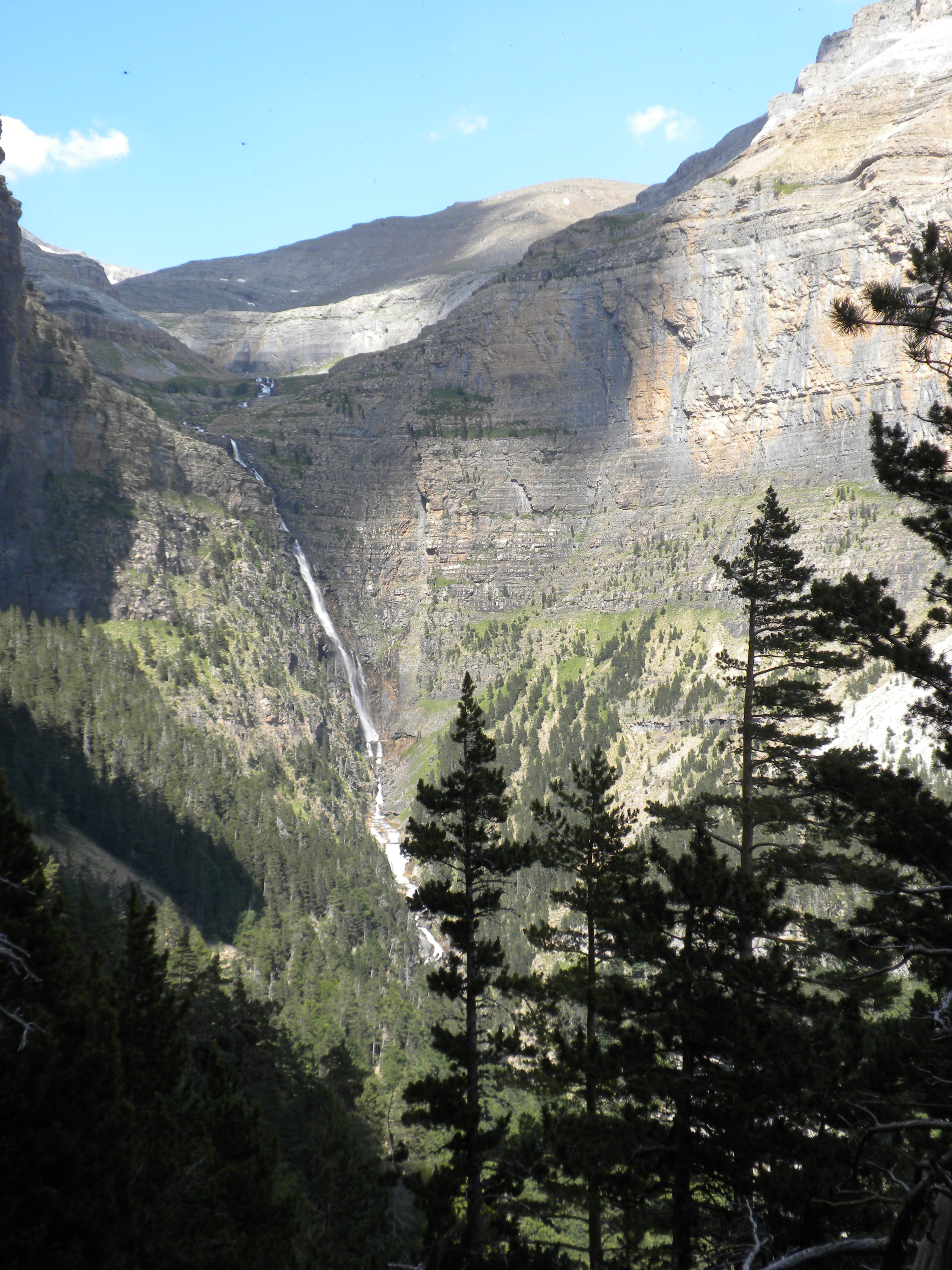 Ordesa et Mont Perdu